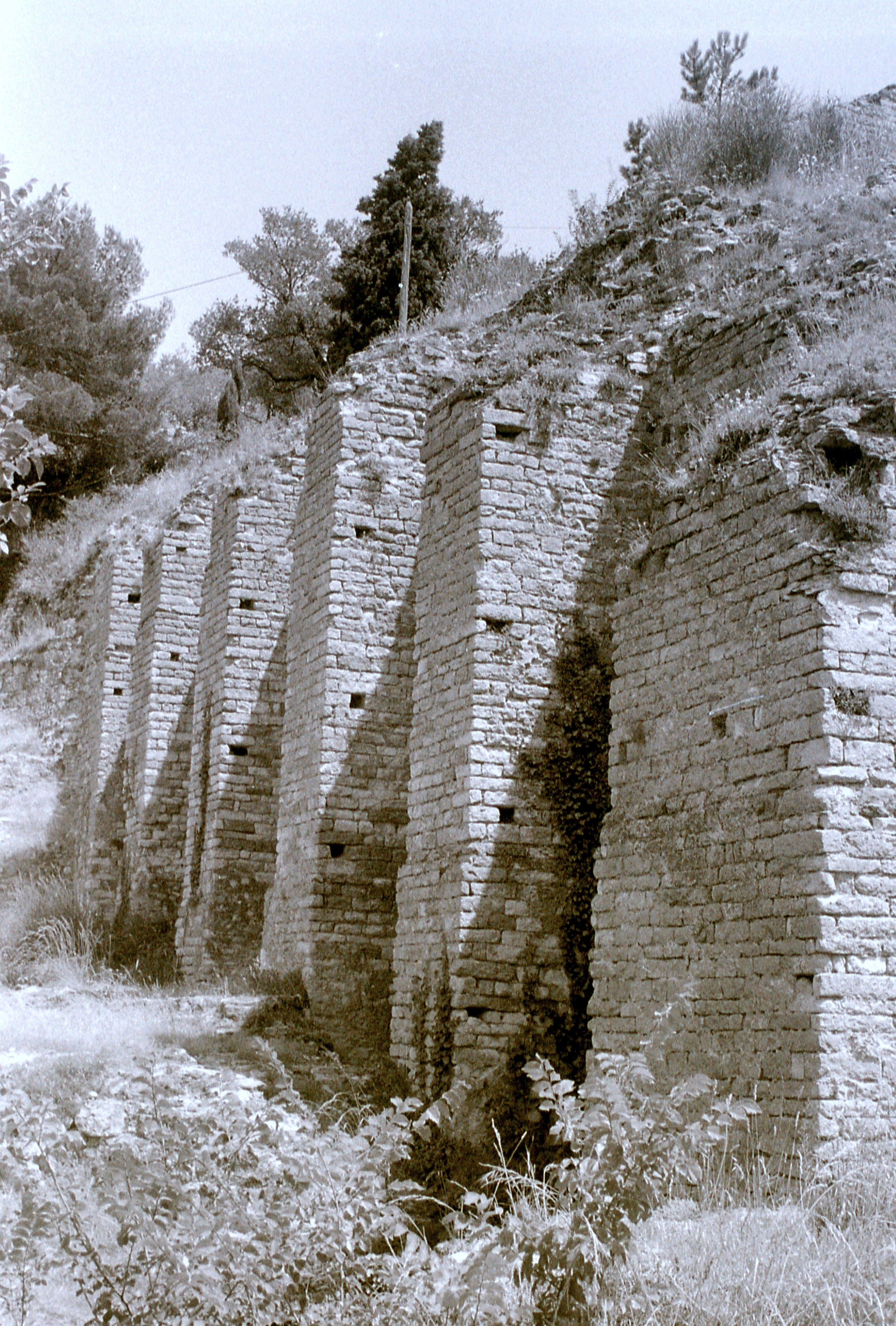 Foto 1976